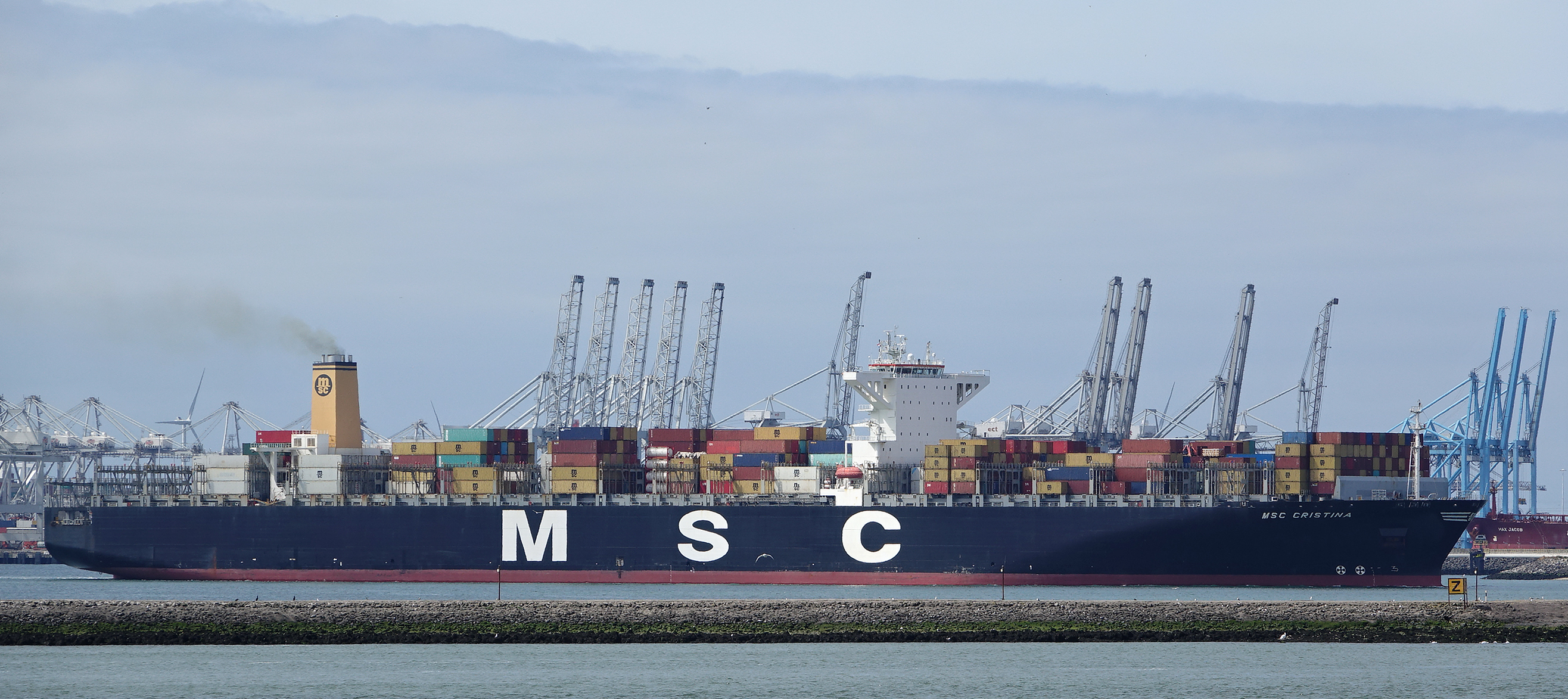 Calandkanaal 3-8-2019